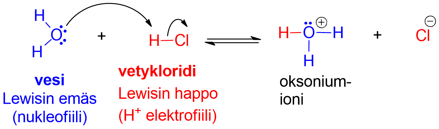 Lewisin happo ja emäs protoninsiirtoreaktiossa